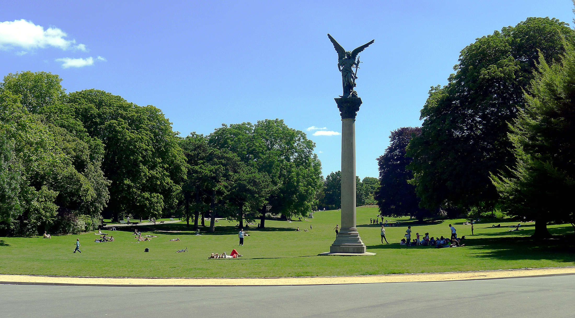 Pelouse autorisée, Parc Montsouris - Paris XIV